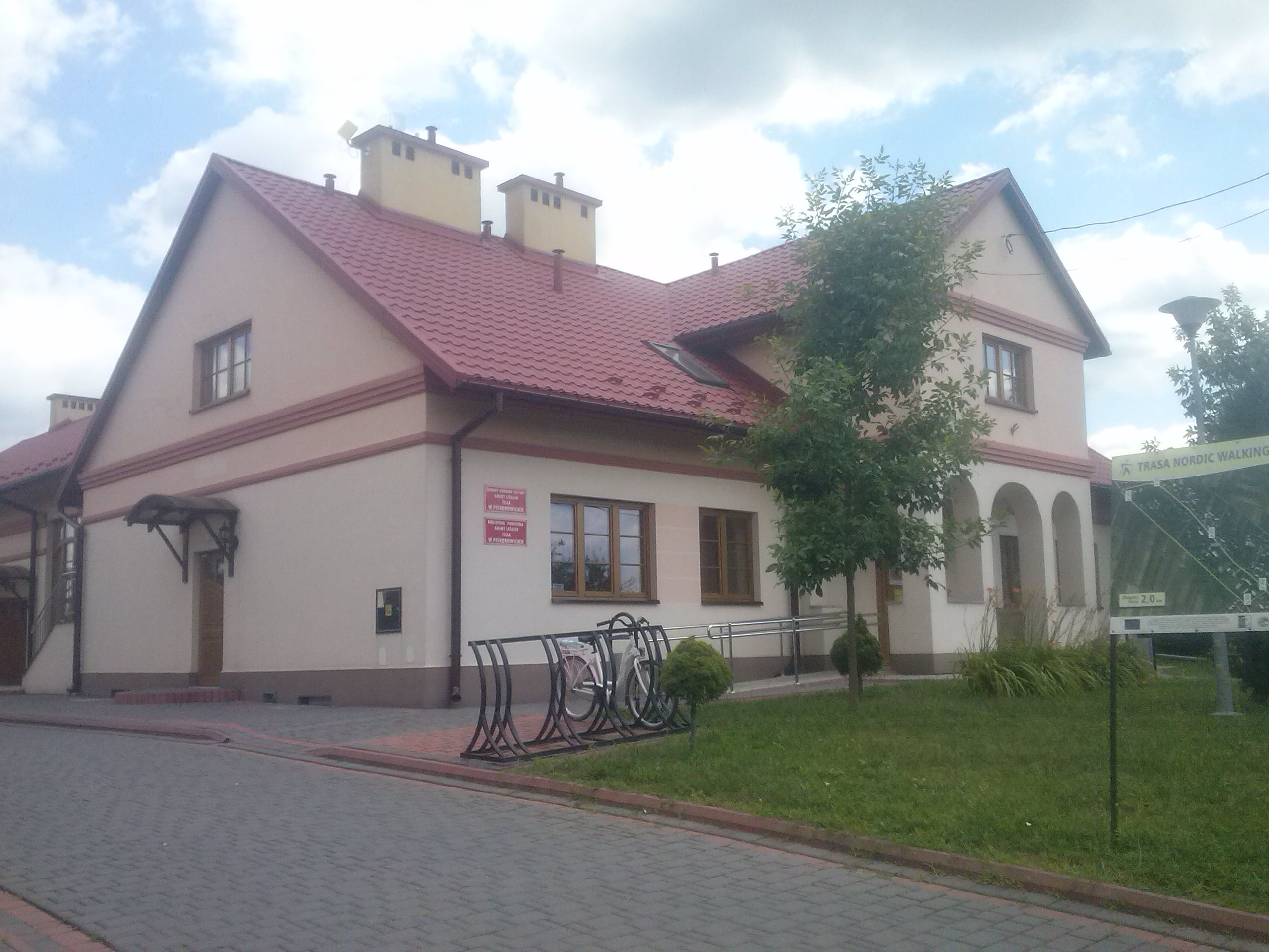 Gminny Ośrodek Kultury w Leżajsku, filia w Piskorowicach